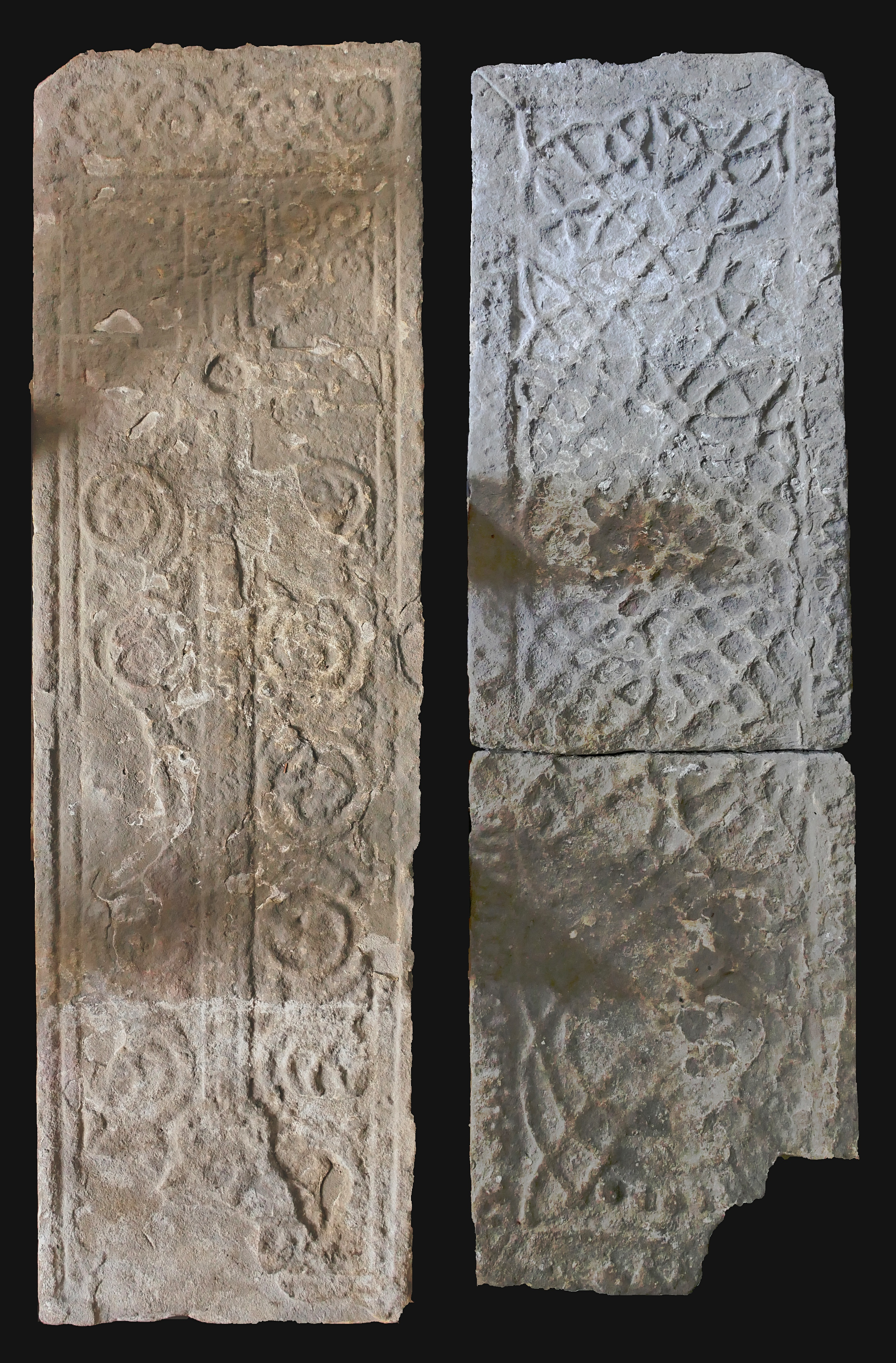 anglo-saxon stones in St. Gergory's Minster